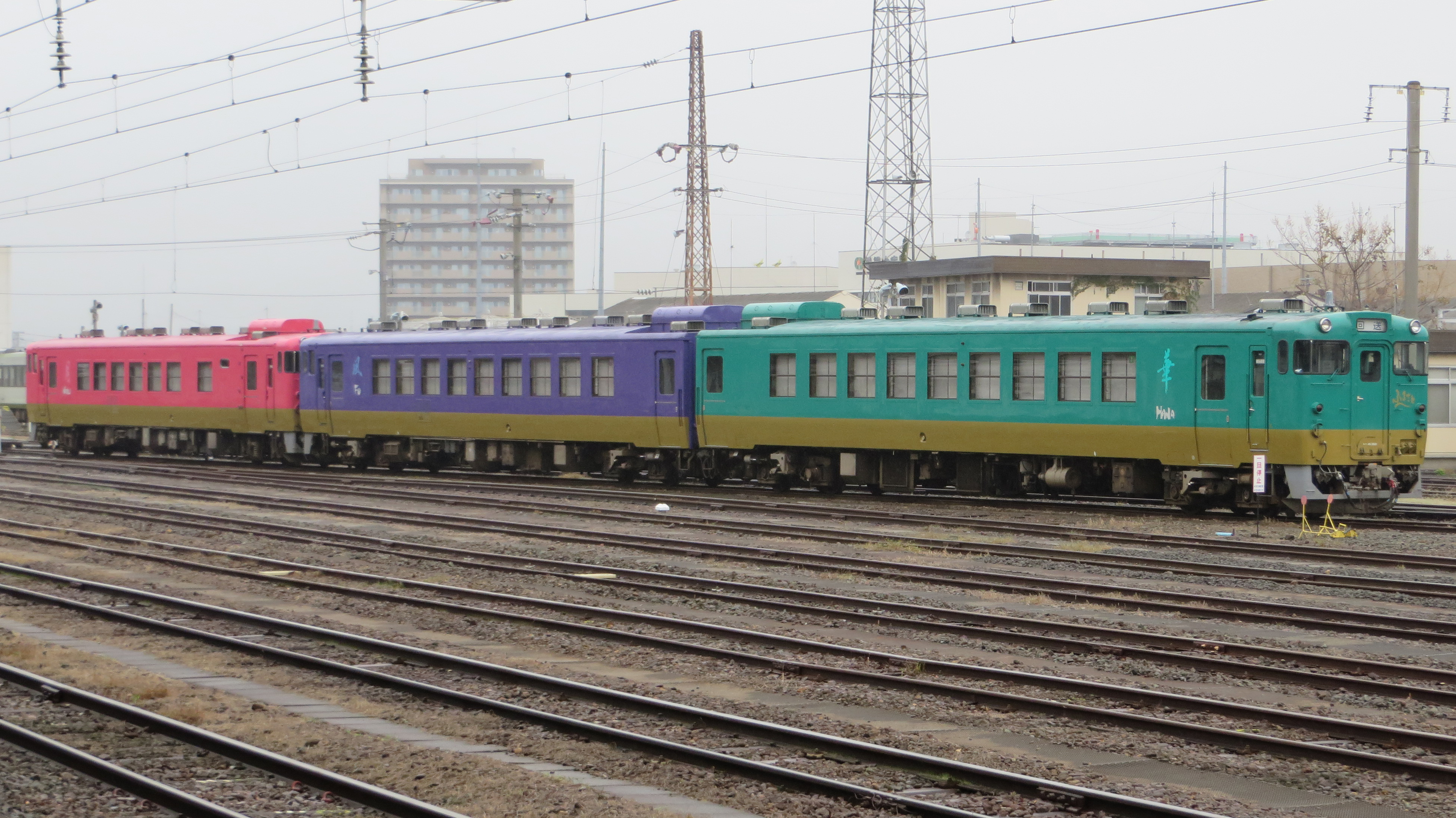 ふるさと 全景